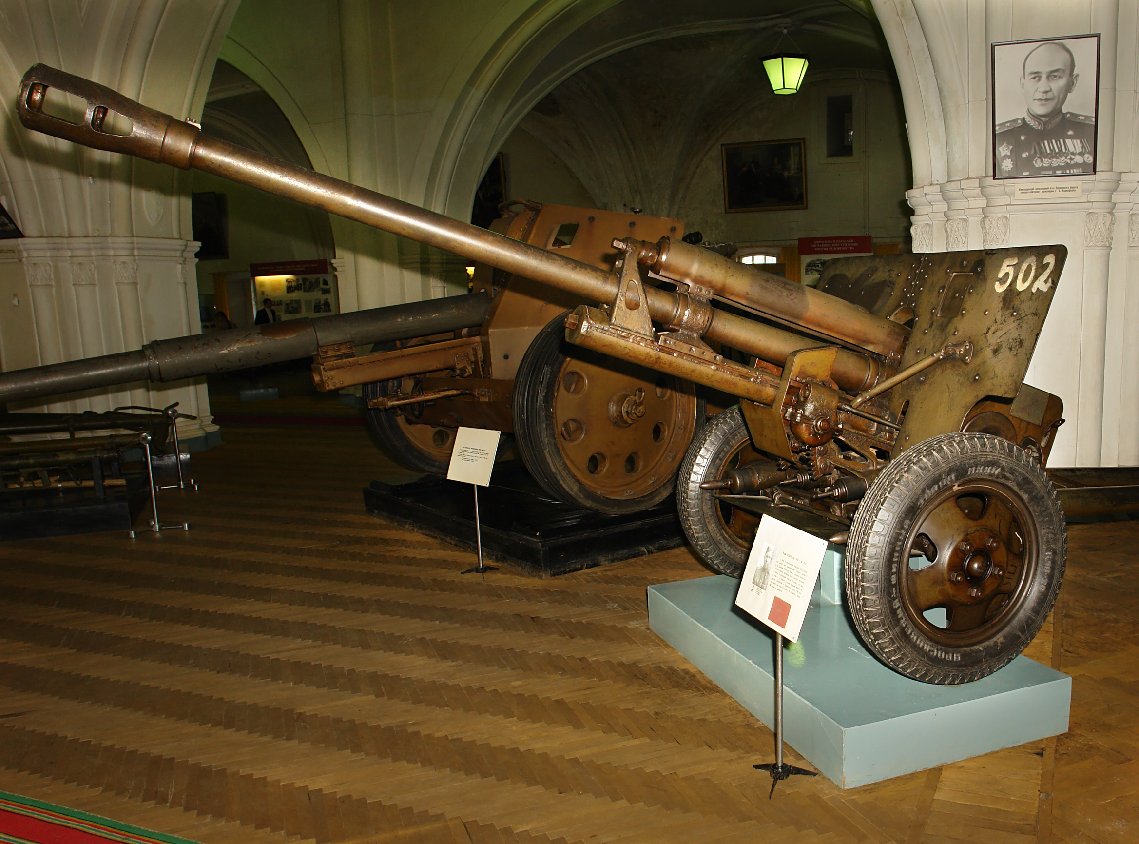 76-мм ПУШКА обр. 1942 г № 11512. В боях за освобождение Советской Литвы орудийный расчет под командованием старшего сержанта Н. А. Сазонова 19 августа 1944 г., отражая контратаки танков и пехоты противника под г. Шяуляй, уничтожил 8 танков, в рукопашной схватке—10 солдат, а 8 взял в плен. Н. А Сазонов со своим орудием прошел по дорогам Белоруссии и Прибалтики свыше 2 200 км, уничтожив при этом 10 танков, 16 пулеметов, свыше 400 солдат и офицеров. Военно-исторический музей артиллерии, инженерных войск и войск связи, Санкт-Петербруг.